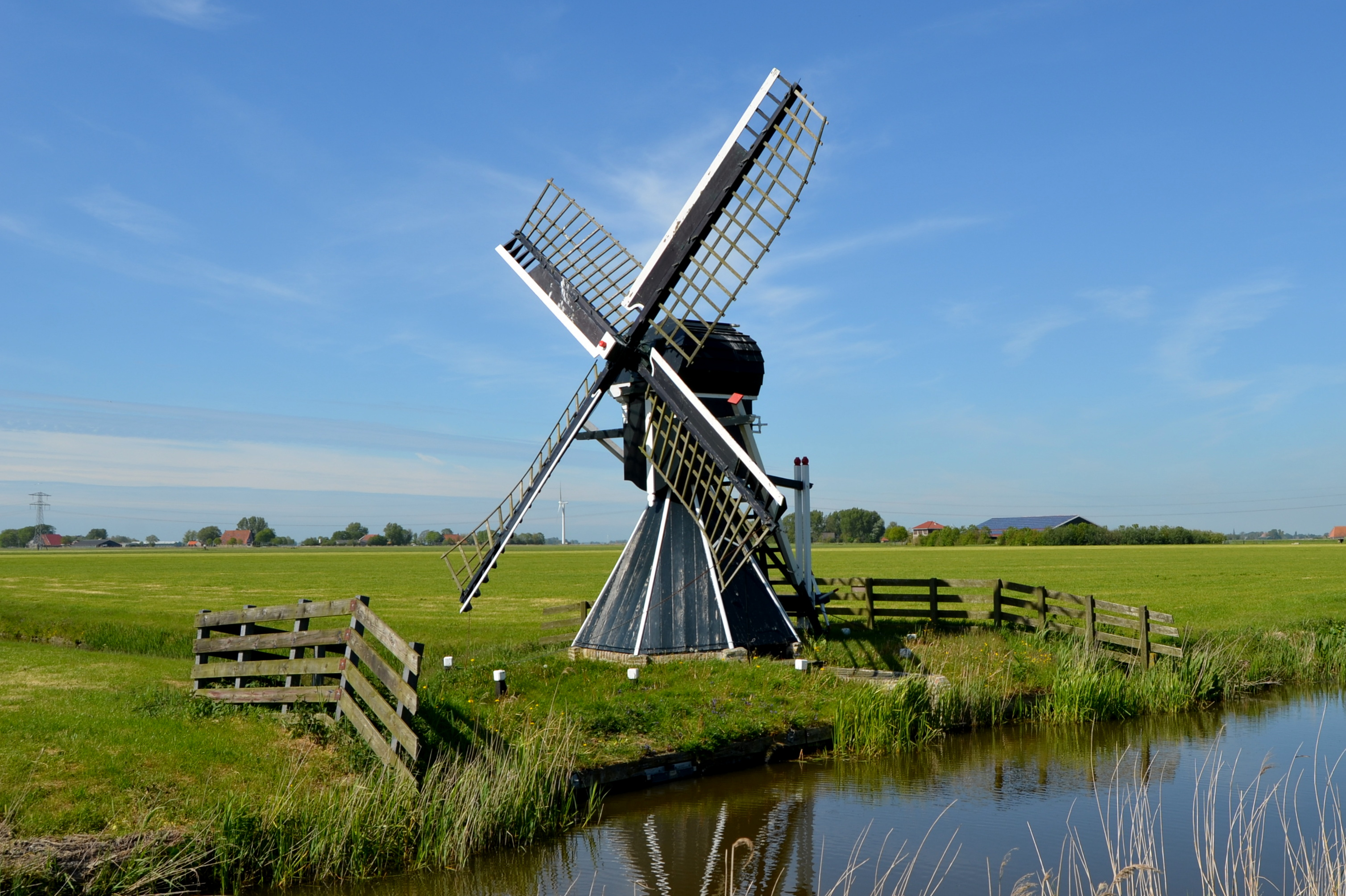 19e ieuwske spinnekopmûne by Hartwert (Fryslân) 19e eeuwse spinnekopmolen bij Hartwert (Friesland)